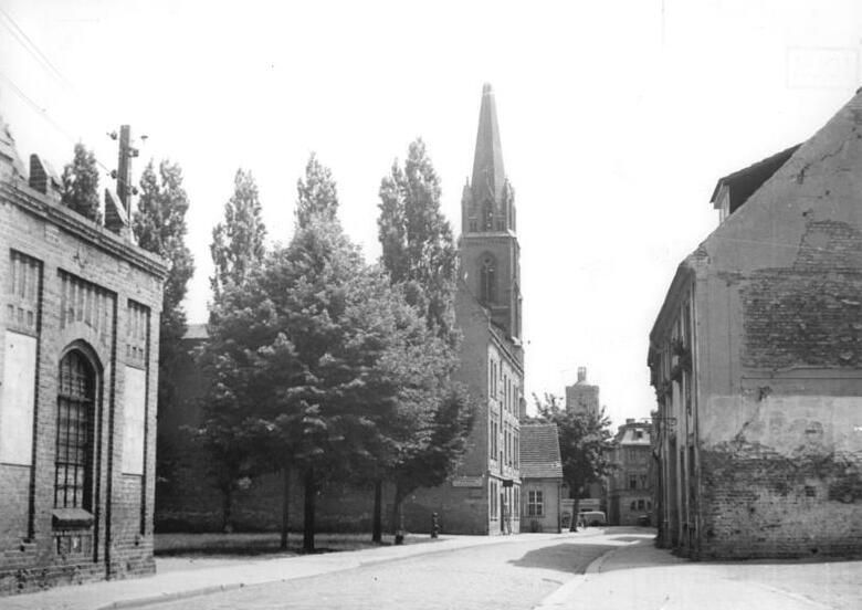 Guben, Kirchstraße Zentralbild Schwadten 9 Motive 29.6.1955 Guben - Die Geburtstadt unseres Präsidenten Wilhelm Pieck. Eine alte Straße, die Kirchstraße. Emil Flaminius (1807–1893) Alternative namesEmil Karl Alexander FlaminiusDescription German architect German architectDate of birth/death18077 October 1893Location of birth/deathKostrzyn nad OdrąBerlinAuthority control : Q109349